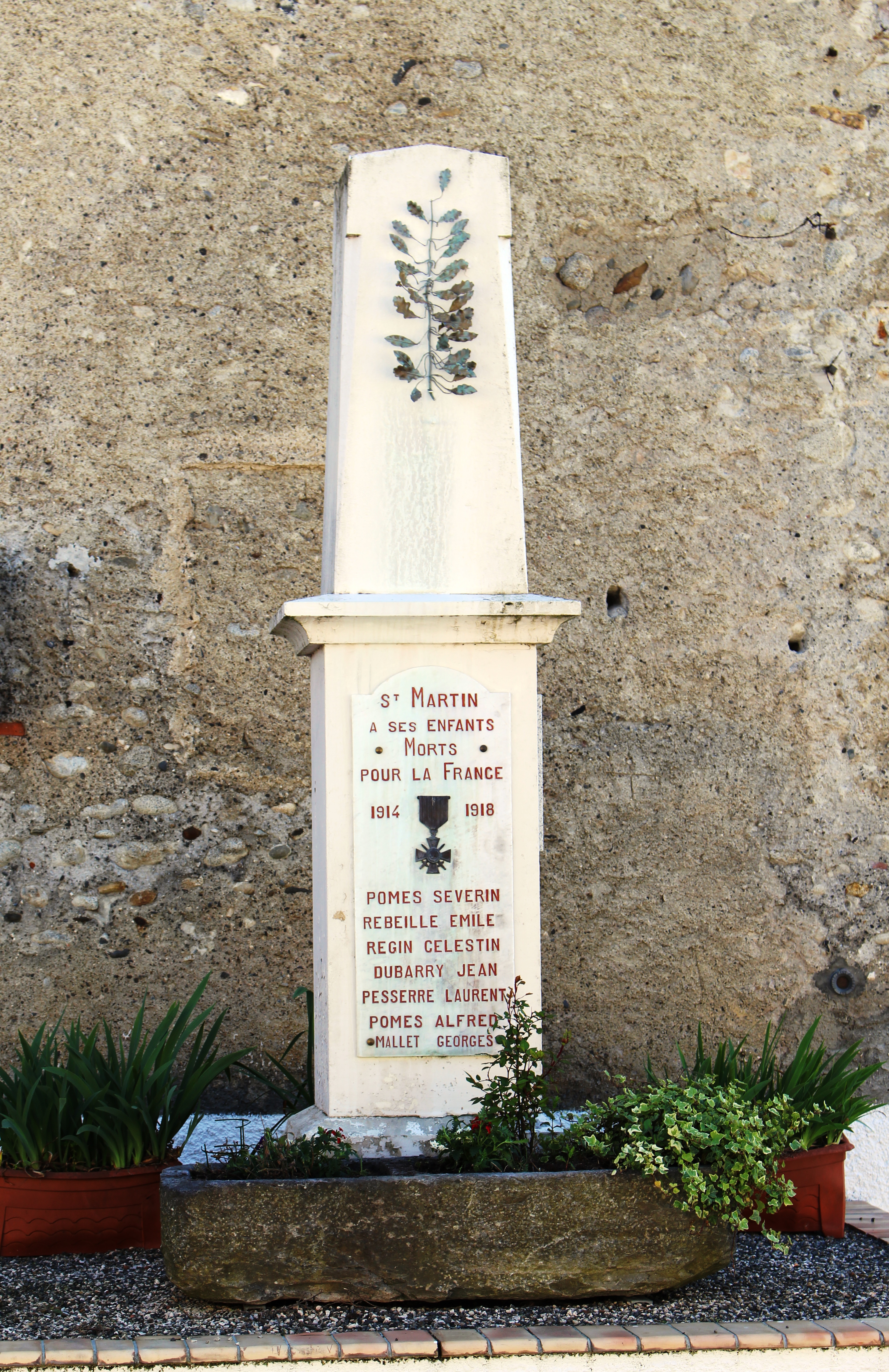 Monument aux morts de Saint-Martin (Hautes-Pyrénées)